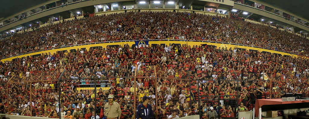 Jogo Sport 4x1 Palmeiras, no dia 30 de Abril de 2008 pela Copa do Brasil. Vista Frontal das cadeiras(na parte superior) e das sociais(na parte inferior).